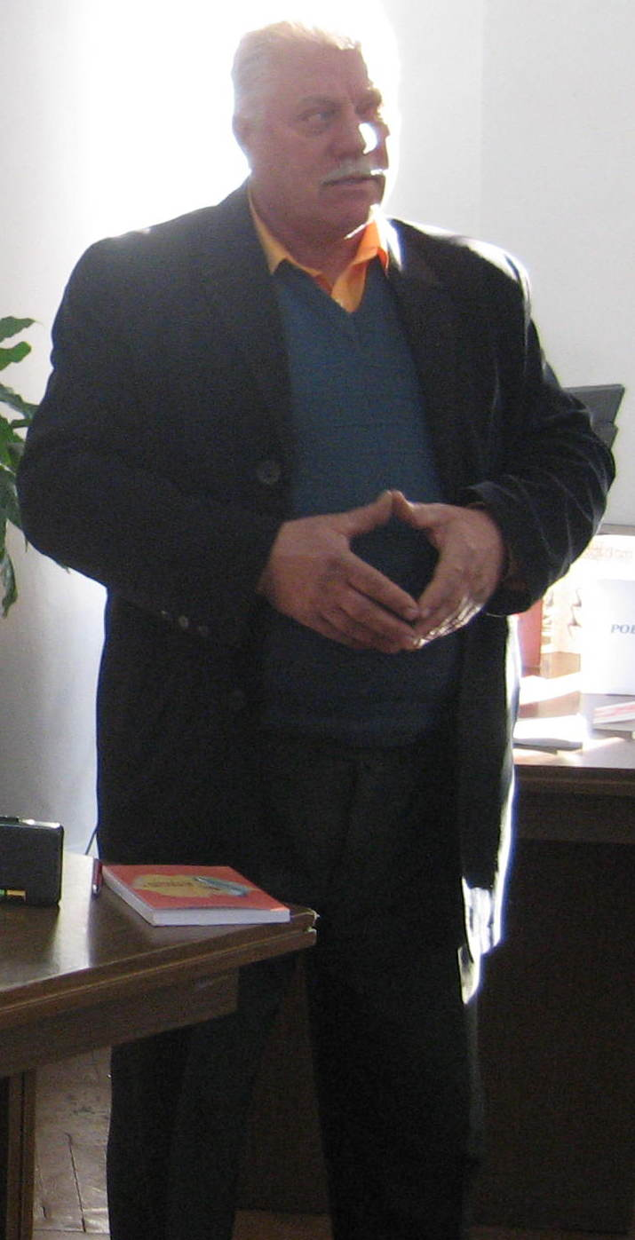 Vitalie Răileanu (critic literar) şi Efim Tarlapan (umorist, scriitor)